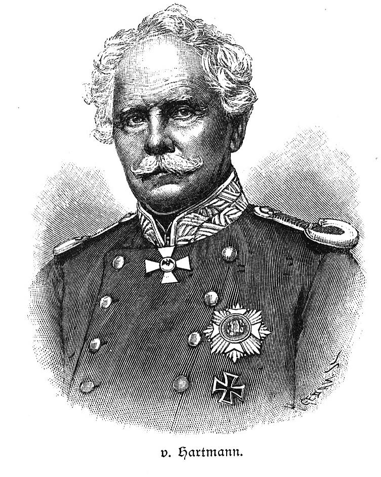 General v. Hartmann (1795–1873), in bayr. Uniform mit preuß. Eisernem Kreuz Erster Klasse (EK I)